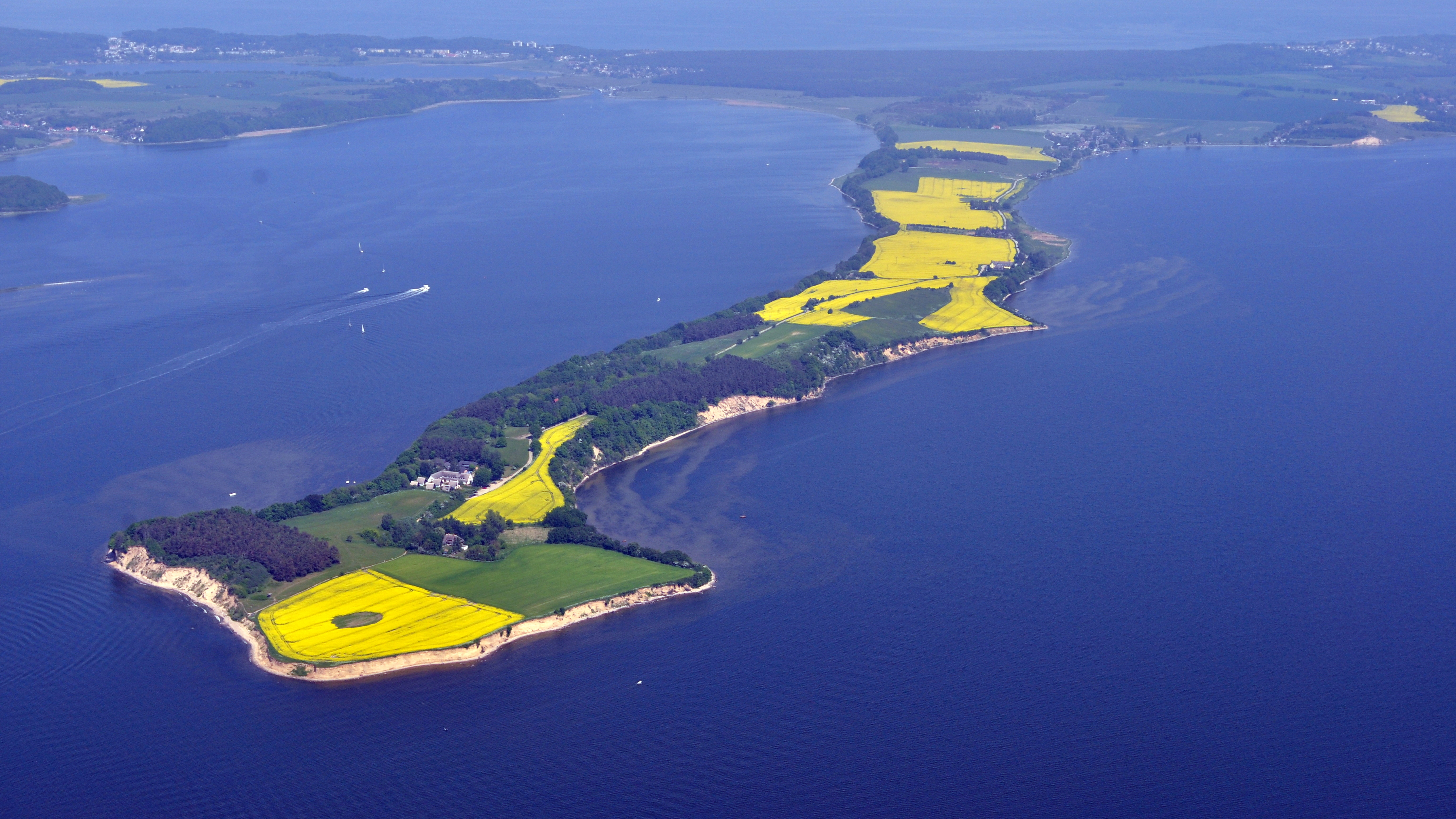 Die Bilder wurden von mir während eines einstündigen Rundflugs ab Flugplatz Güttin am 21. Mai 2011 aufgenommen. Die Bildbeschreibung steht im Dateinamen. Aufgenommen mit einer Nikon D5000 durch das Seitenfenster des Flugzeugs.